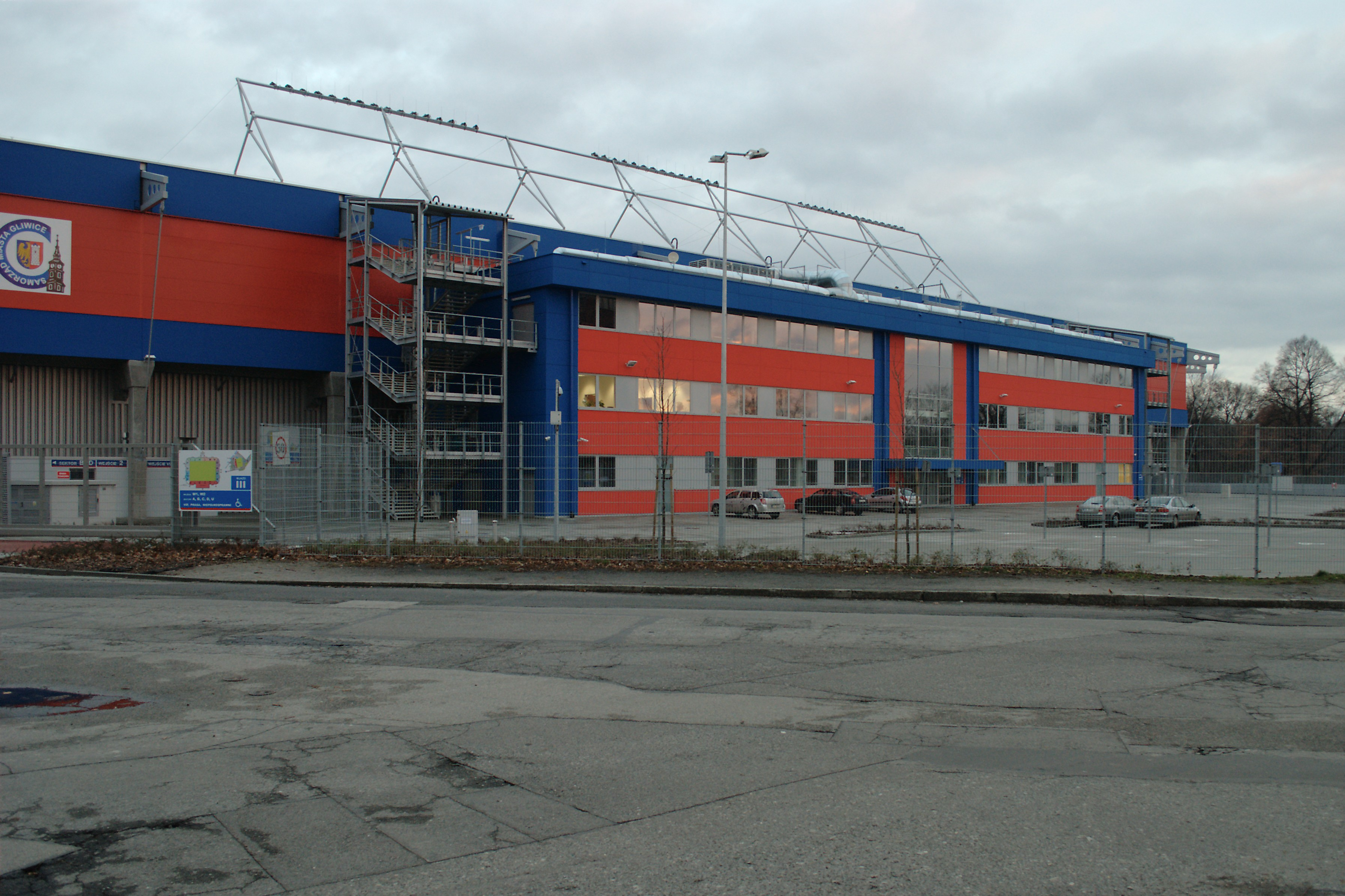 Nowy stadion Piasta Gliwice.